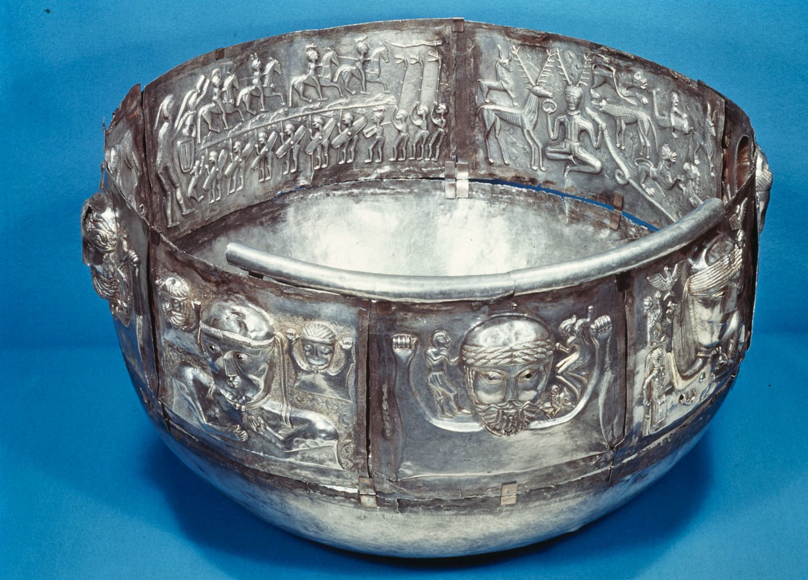 Kar fra Gundestrup, Ålborg Amt. Sølv med forgyldning. Votiv/depotfund, mose. Førromersk jernalder.